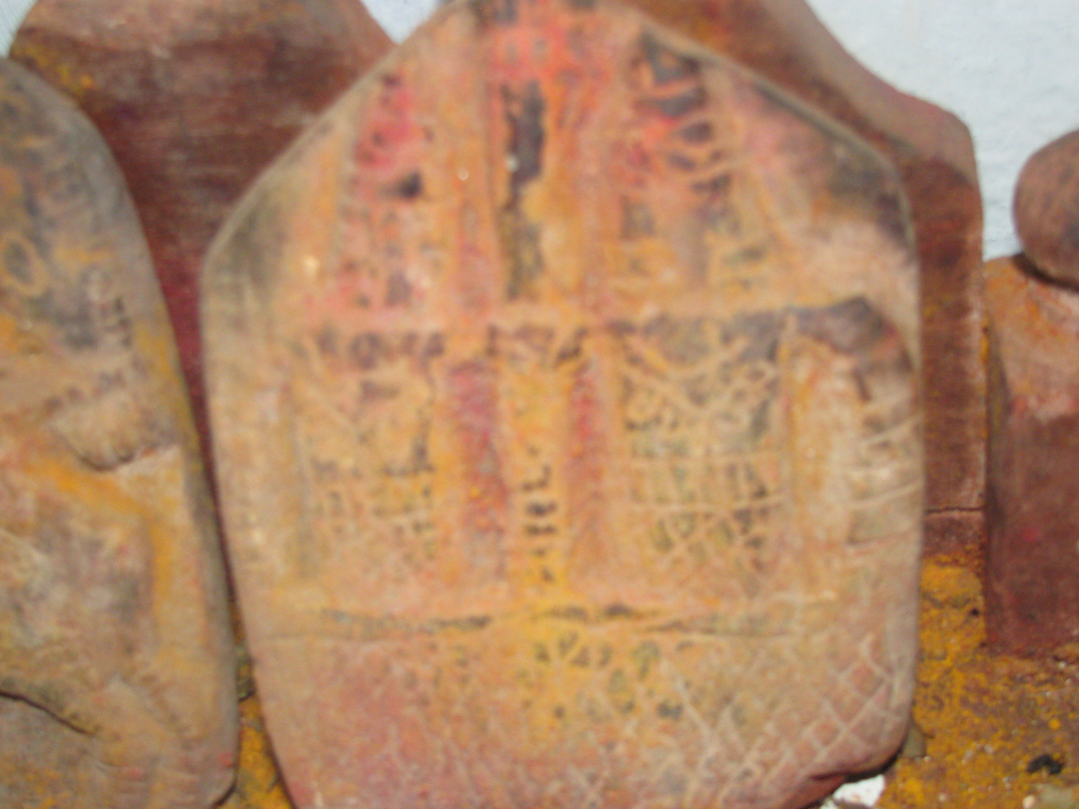 వీరగల్లులలో ప్రత్యేకం